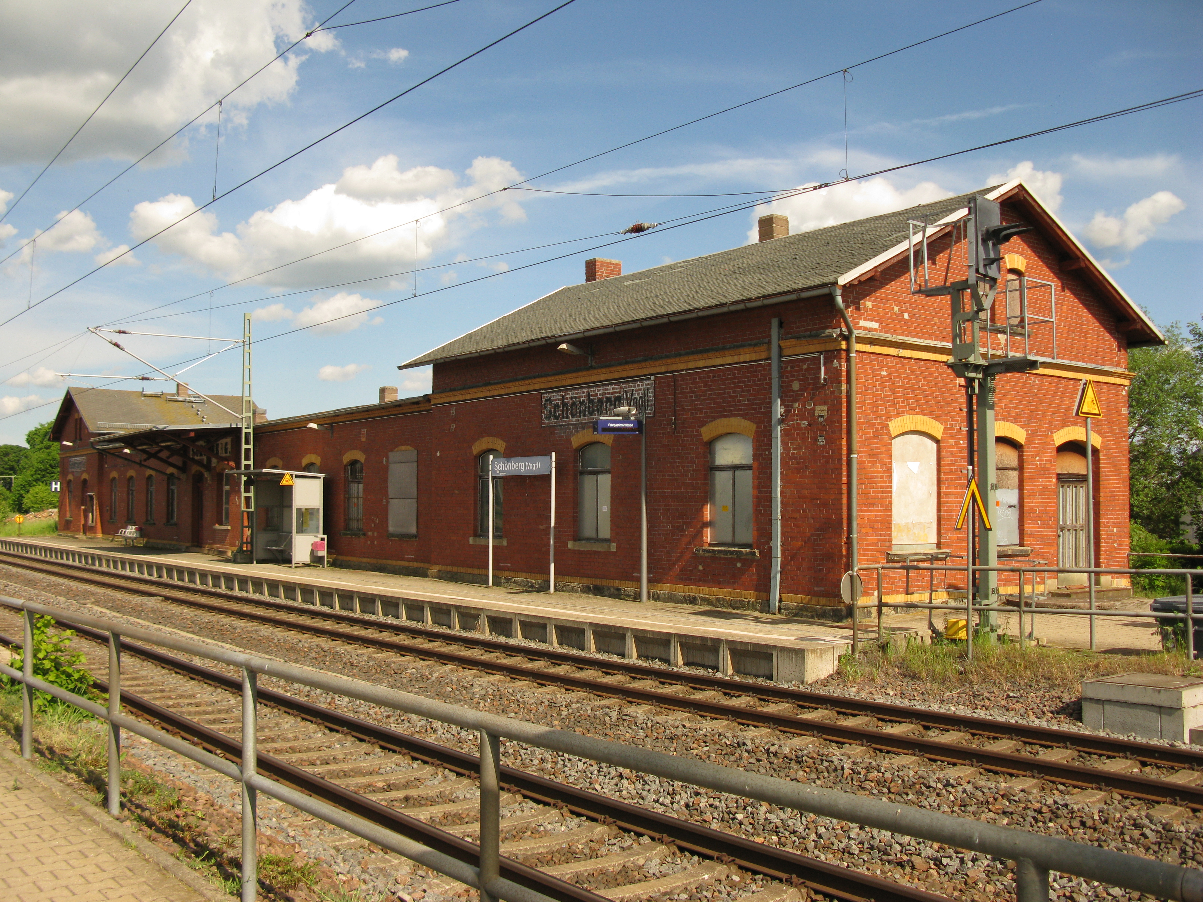 Der Bahnhof Schönberg (Vogtl) im Rosenbacher Ortsteil Schönberg.